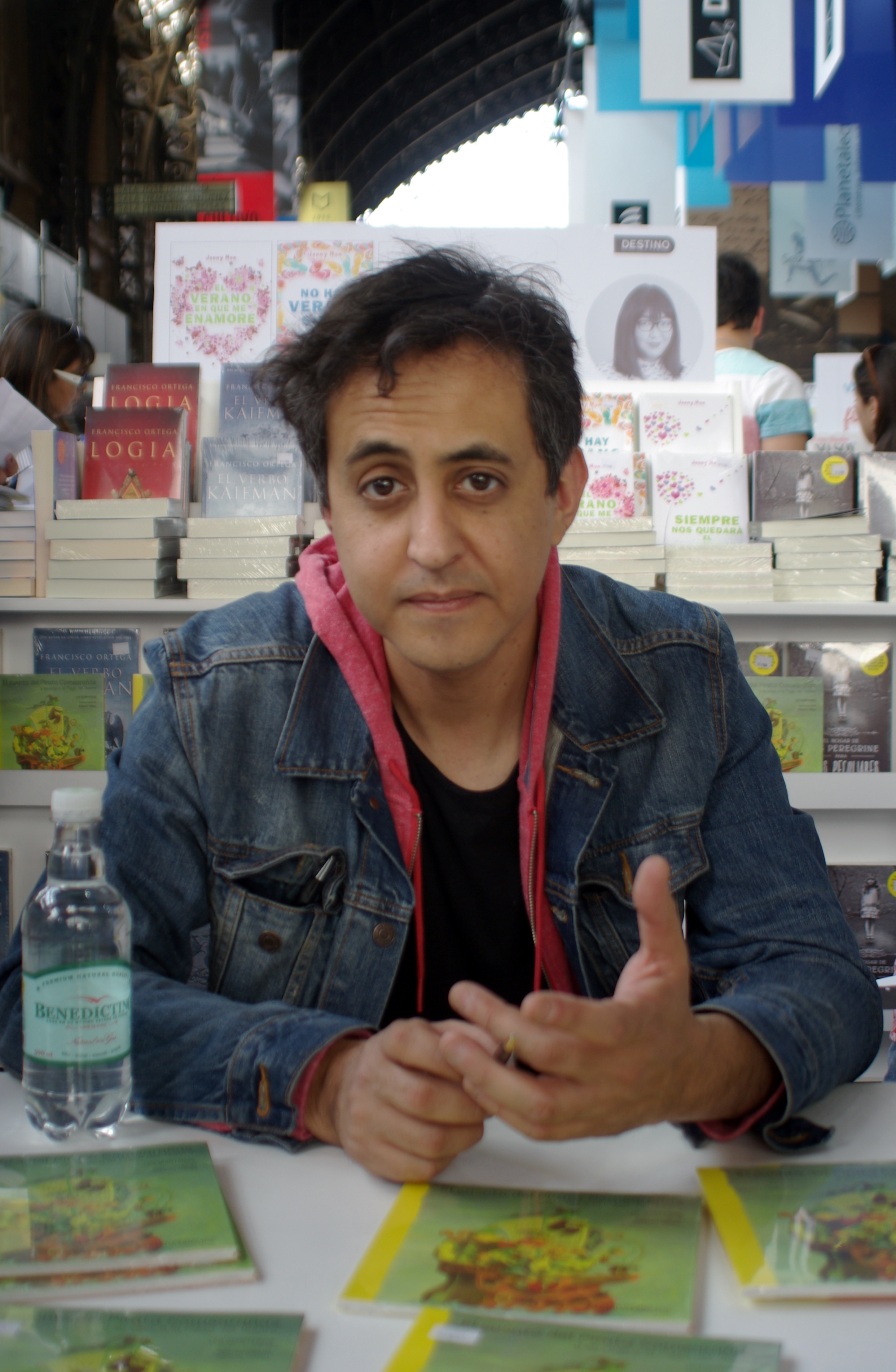 El cantautor y escritor chileno Leo Quinteros en la Feria Internacional del Libro de Santiago 2015